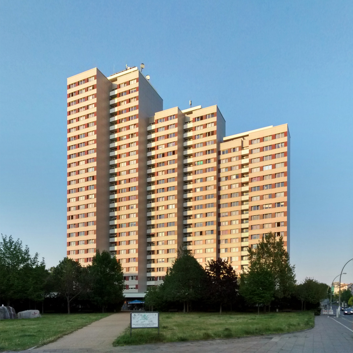 Wohnhochhaus, Platz der Vereinten Nationen, ehemals Wohnkomplex Leninplatz, Hermann Henselmann (Wettbewerbsentwurf), Heinz Mehlan und Kollektiv (Ausführungsplanung), 1968–1970, Berlin-Friedrichshain, Plattenbau Typ WHH GT, Mai 2016